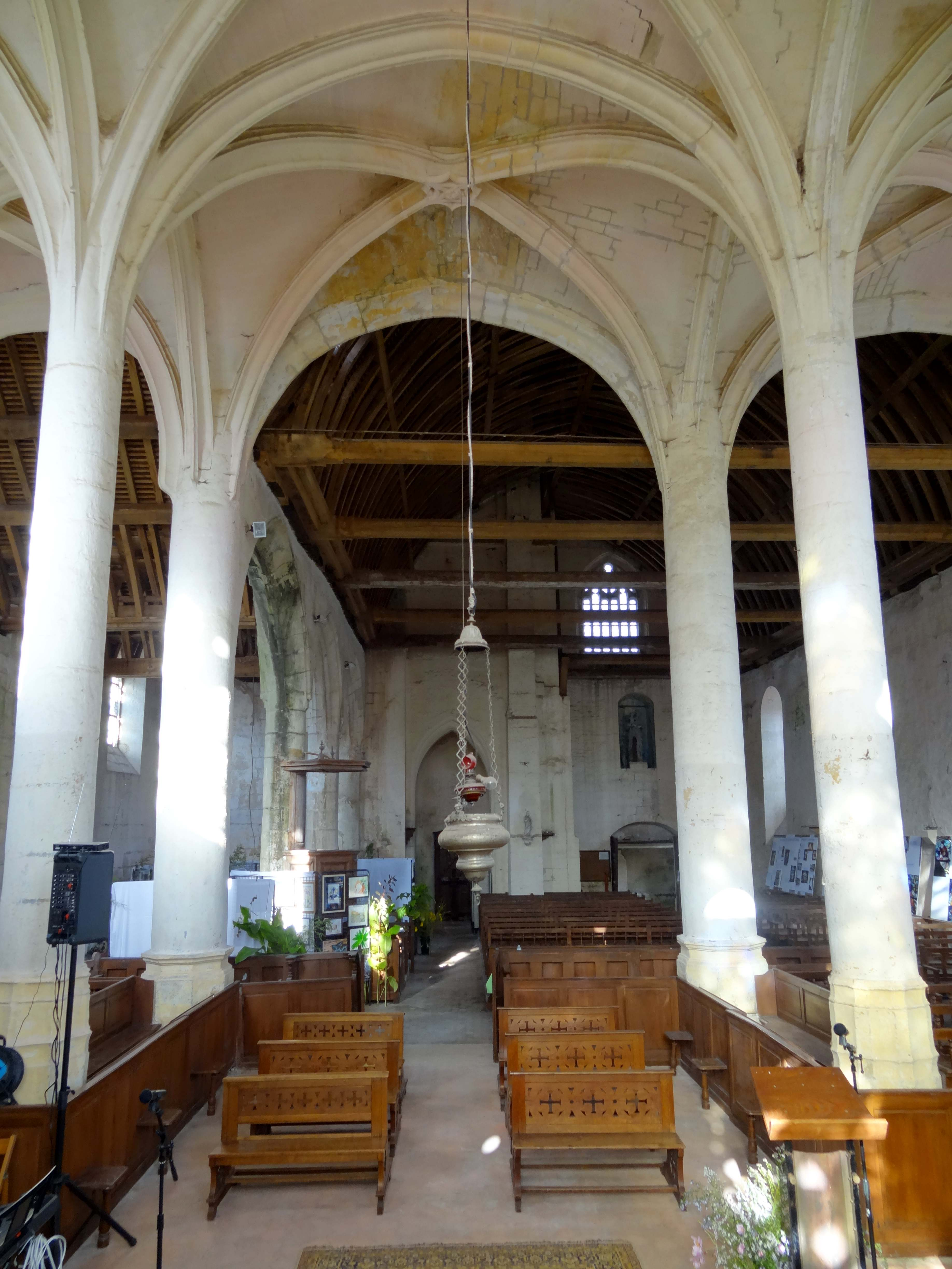 Intérieur de l'église - voir titre.